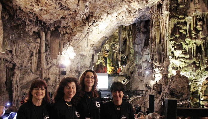 Primera edición del Gibraltar World Music Festival 2012/ Sephardic Divas. Se realizó en St Michael's Cave y Tom Cohen presentó a las artistas Francoise Atlan, Sarah Aroeste, Grupo Ofir y Mor Karbasi. Vocalista Josefina Gómez, Guitarrista Ángel Ontalva, Saxofonista Fran Mangas, Teclado Víctor Rodríguez, Amanda Pazos en el Bajo Eléctrico y Tony Mangas en Drums y percussión. Patrocinadores: Margaux Philanthropy, Centro Sefard israel, Show Dance Company, Mapamundi Musica, Hassans, Matanel, Schimmel Family Charities, Hiperión Family Office, Aicha, Societe Generale Private banking, Sephardic Stories . Foto Pedro Guzmán, Yael Benady